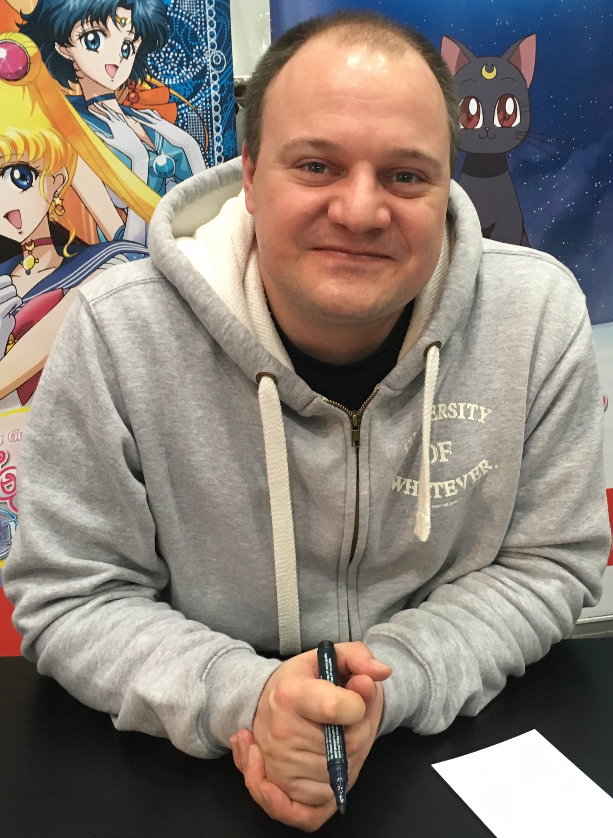 Dominik Auer bei einer Autogrammstunde auf der Leipziger Buchmesse 2016.